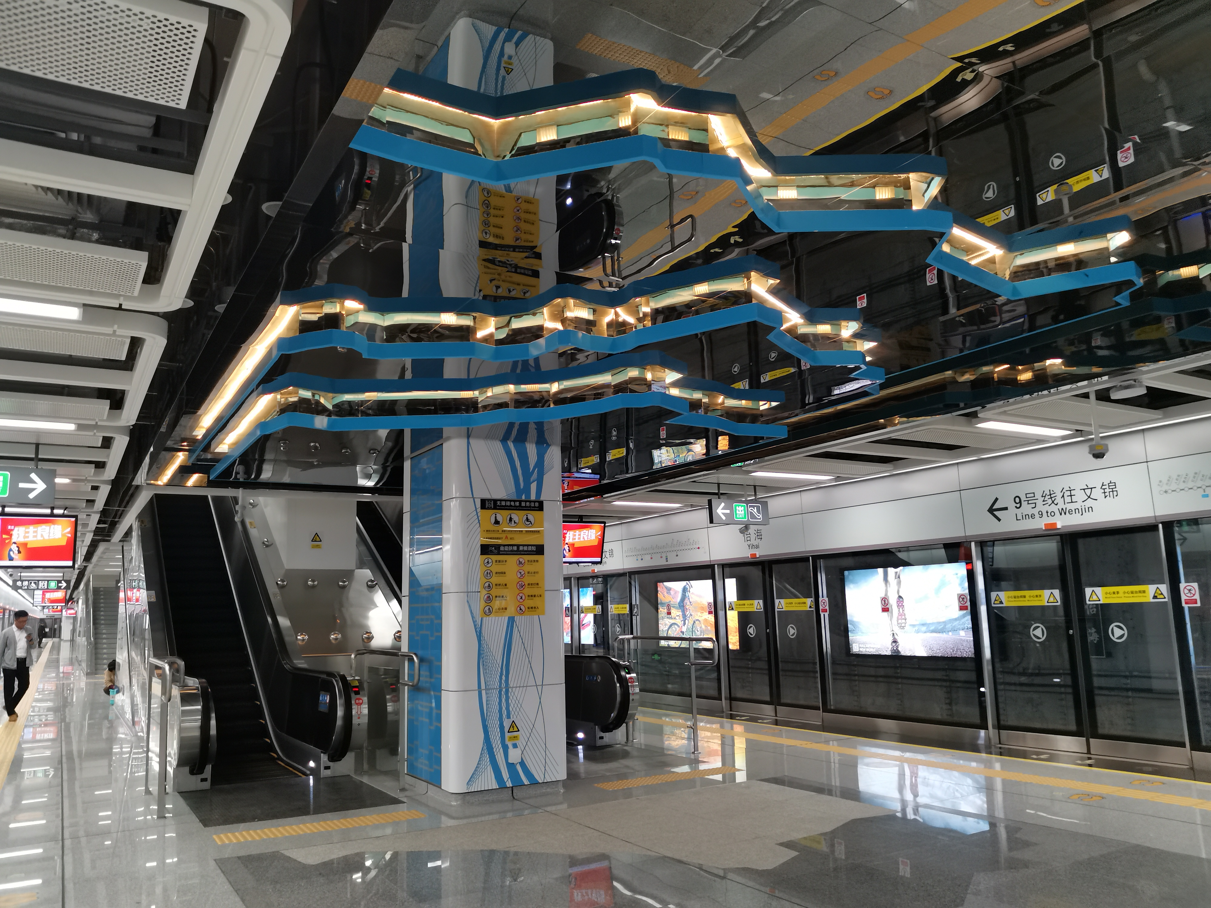 怡海站月台，灯饰以海洋为主题